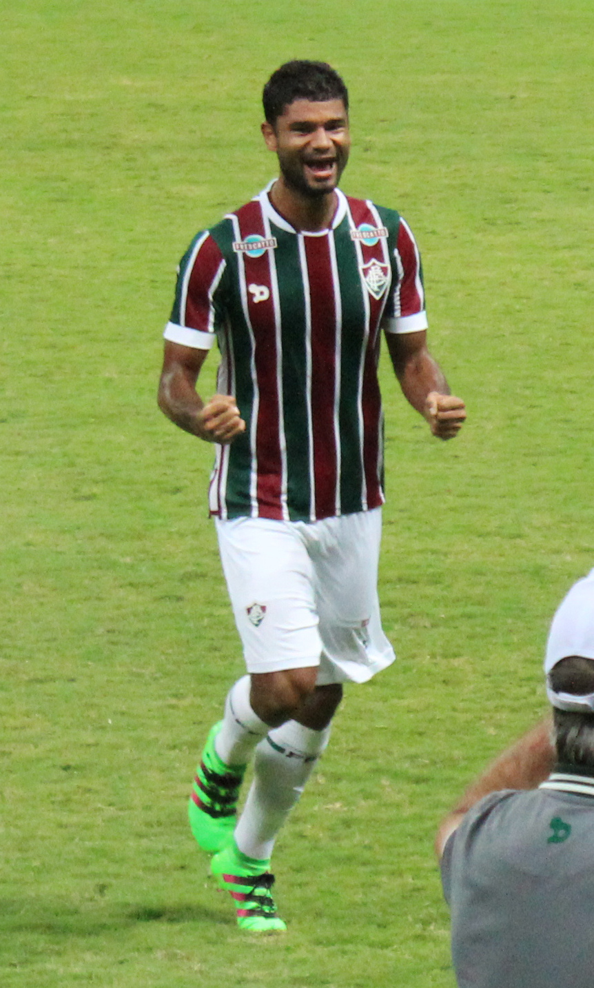 Gum na partida Fluminense x Internacional, semifinal Primeira Liga, Estádio Nacional Mané Garrincha, Brasília (DF), Brasil.